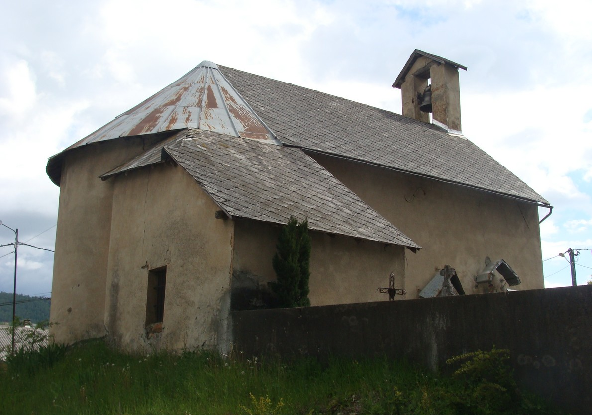 La petite église de Chabottonnes, accolée à son cimetière. Le toit traditionnel en larges ardoises a été remplacé par une couverture en zing sur l'abside.